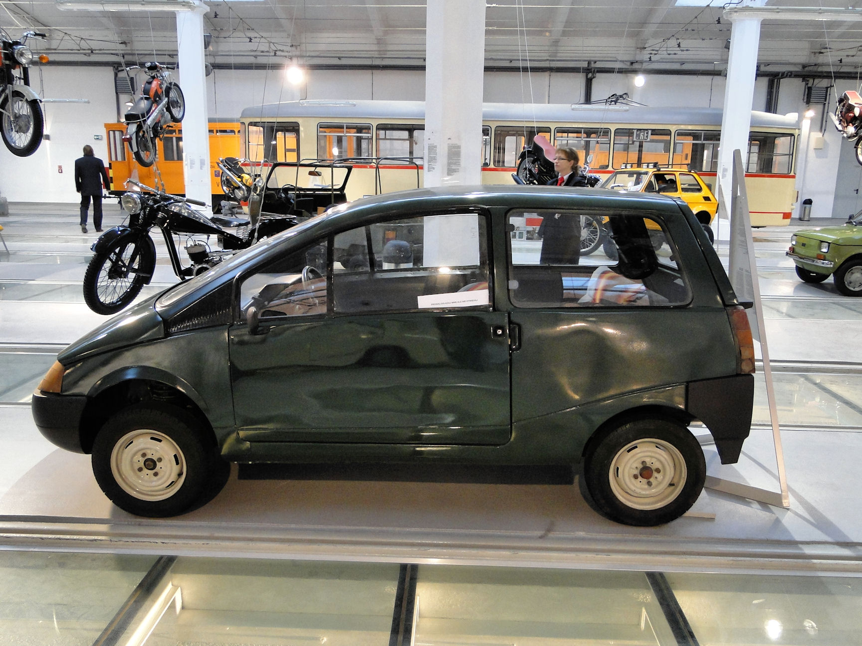 Samochód Beskid